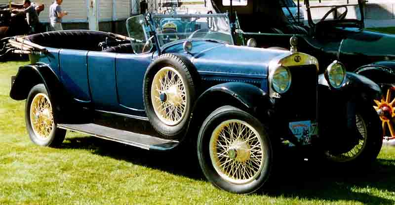 Delage DI 6-Seater Tourer 1925